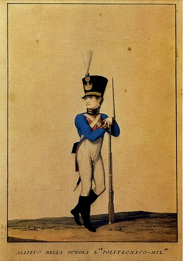 Allievo Nunziatella decennio francese